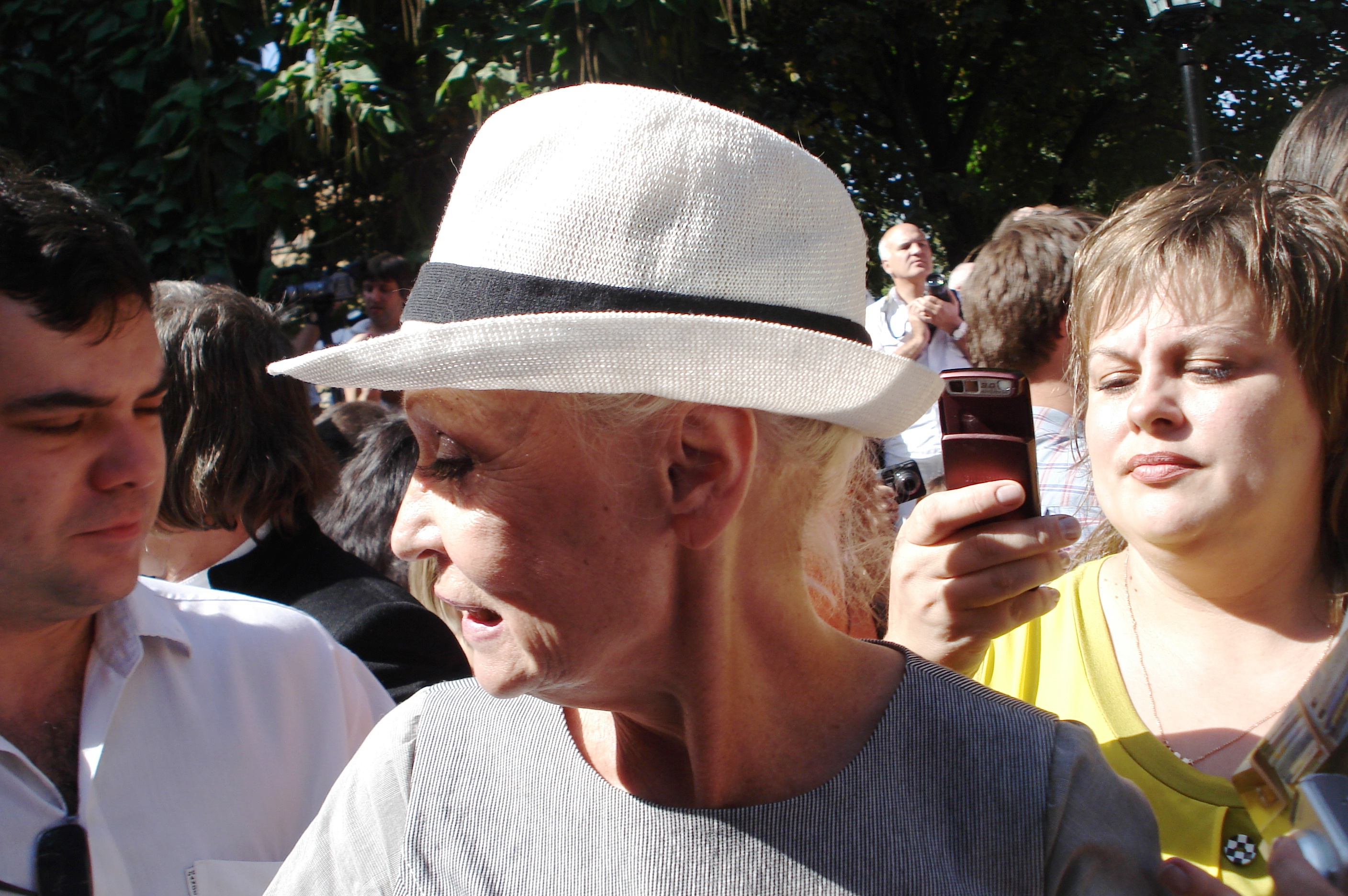 Светлана Светличная на открытии памятника Высоцкому в Воронеже